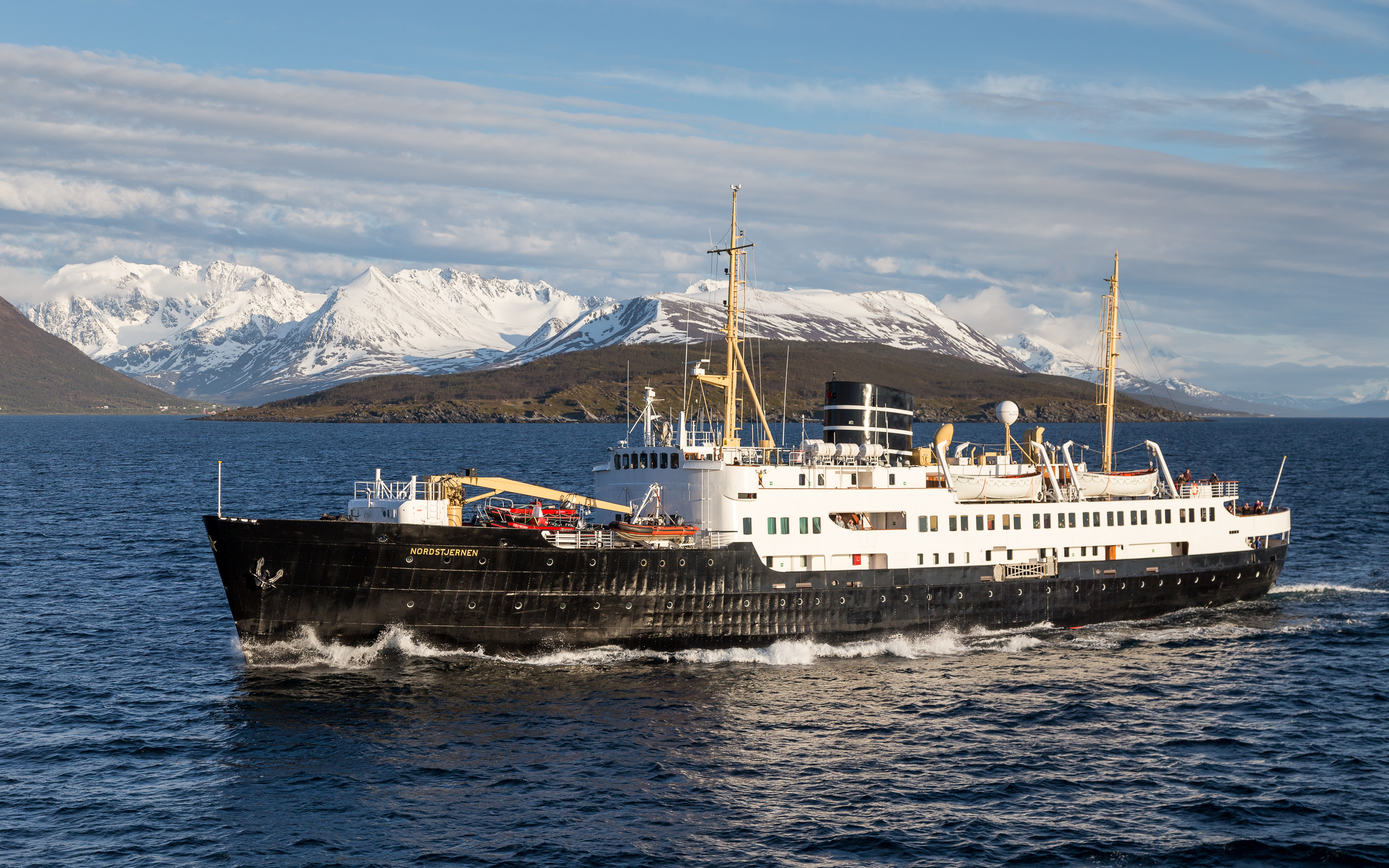 Das ehemaligen Hurtigruten-Schiff NORDSTERNEN mit den Lyngenalpen im Hintergrund